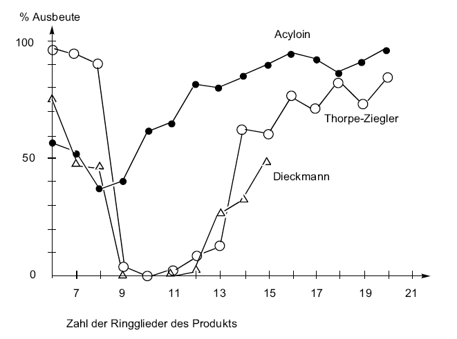 Ausbeuten bei verschiedenen Ringschlußreaktionen